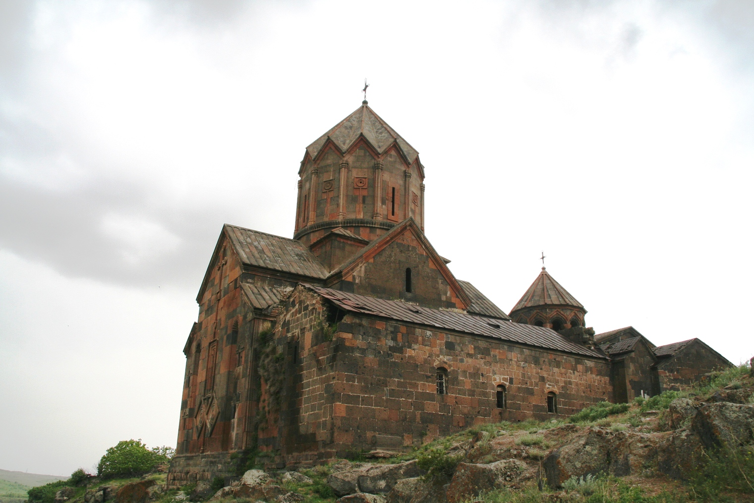 Monastère de Hovanavank, Arménie